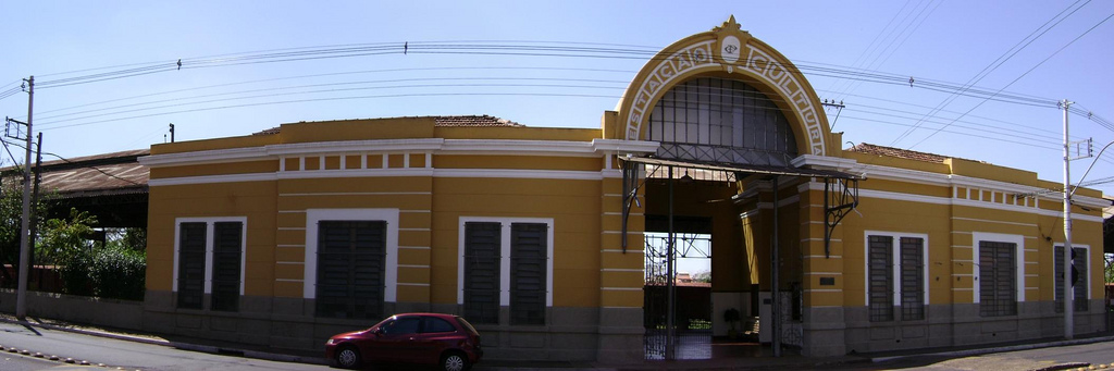 Antiga estação ferroviária de Bebedouro, hoje centro cultural.